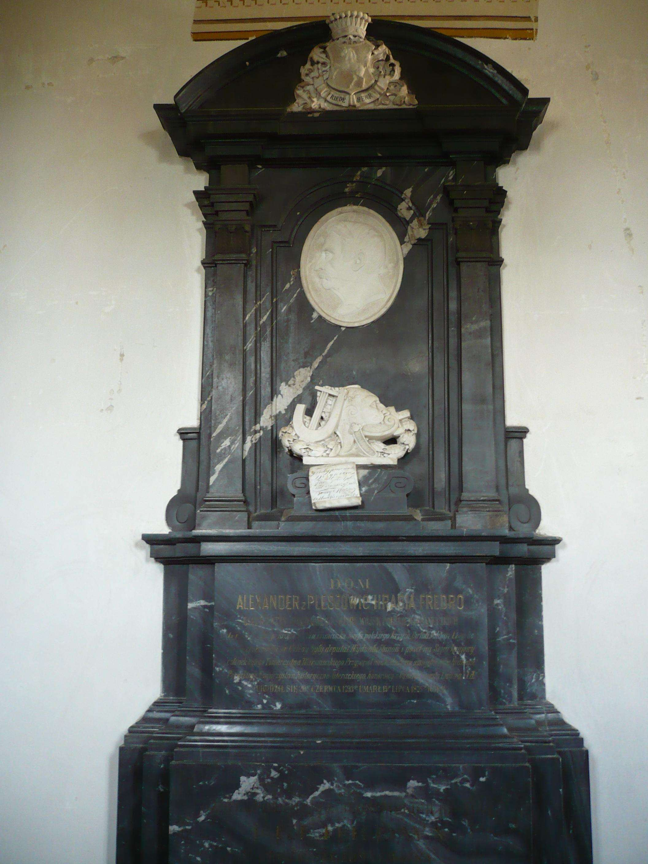 Epitafium A. Fredry w nawie kościoła